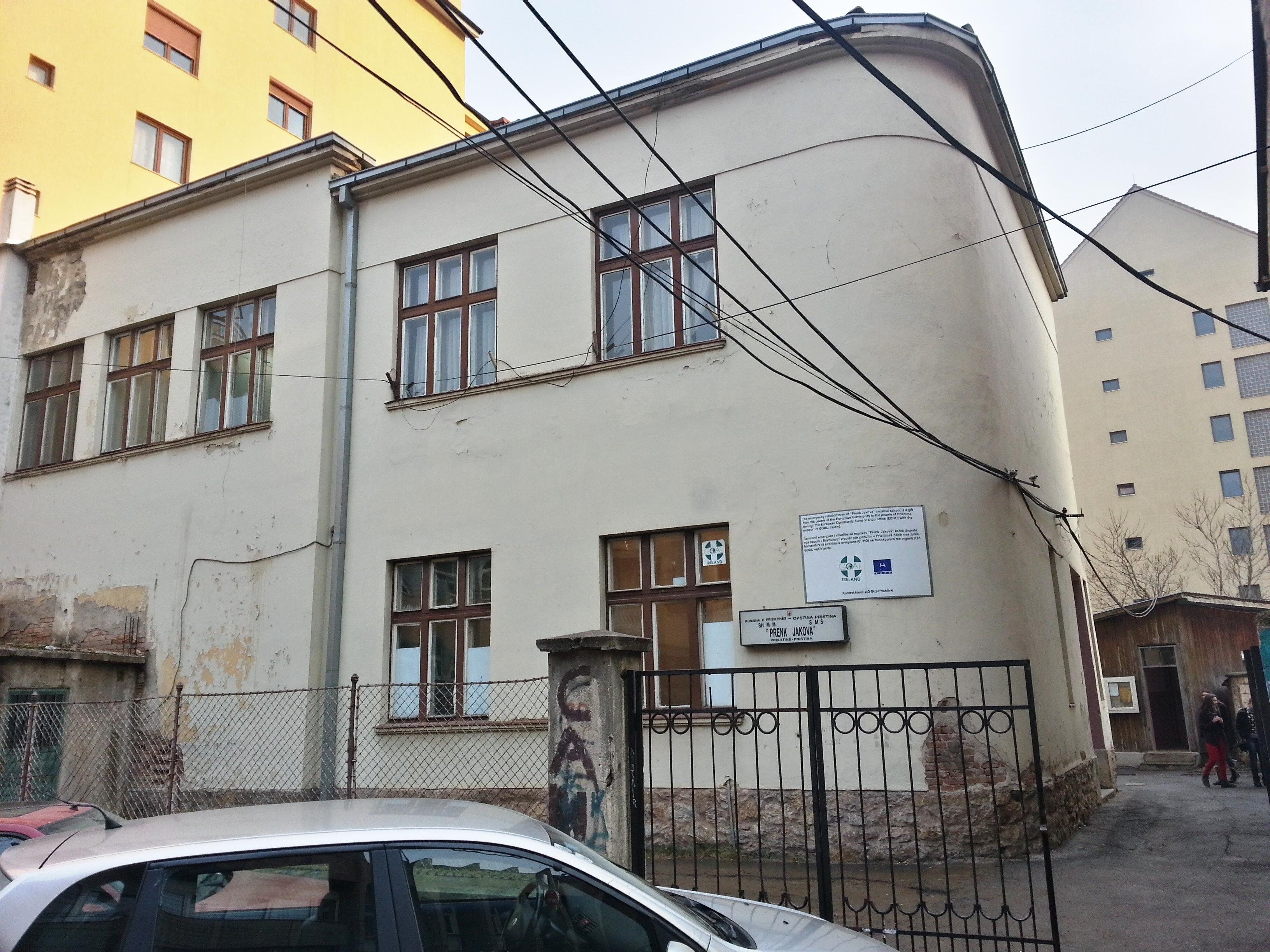 Ndërtesa e shkollës së mesme të muzikës në Prishtinë